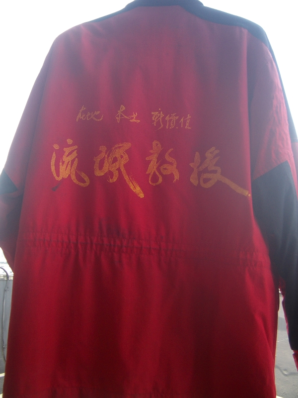 台視八點檔連續劇《流氓教授》工作服背面